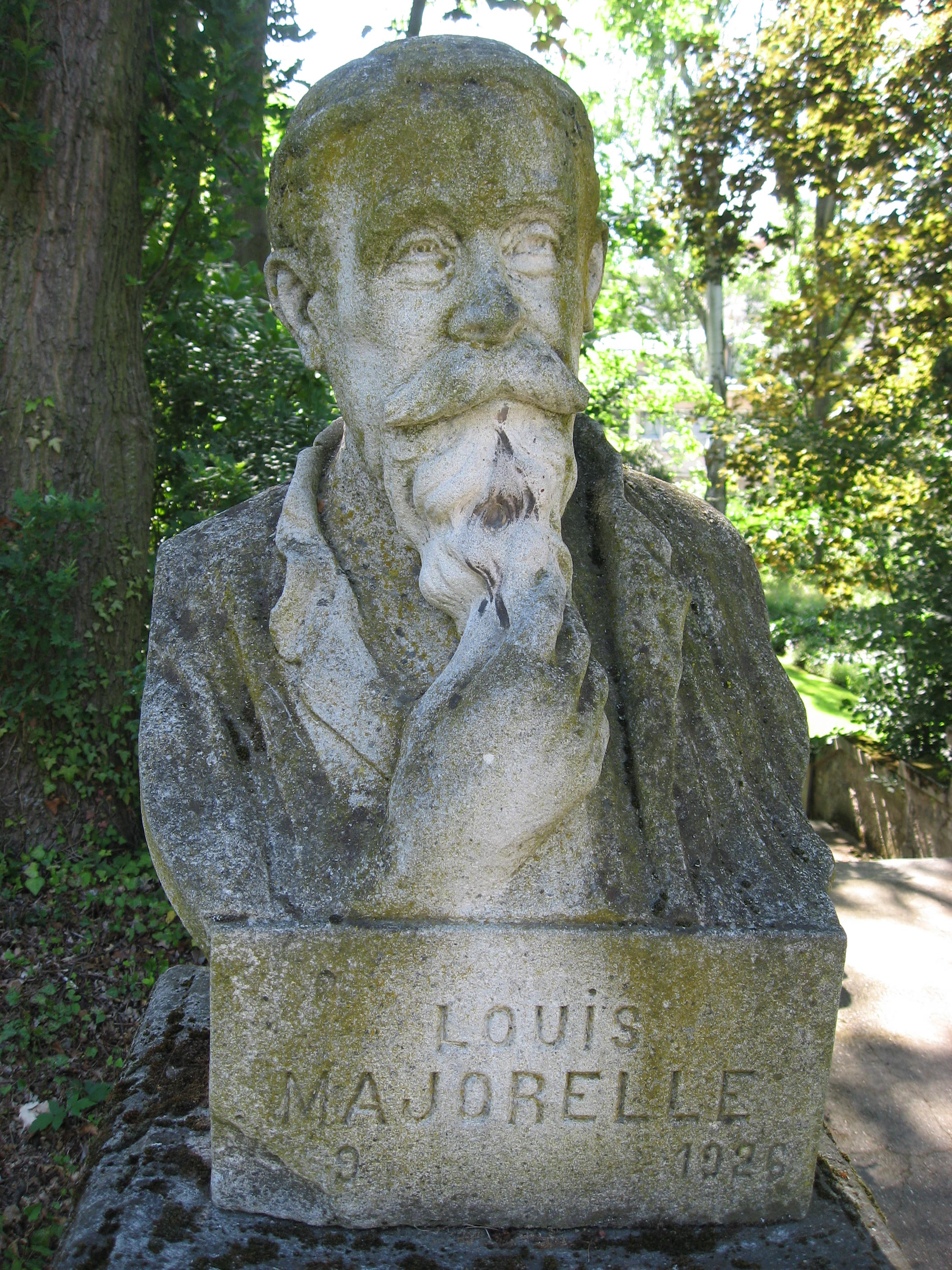 Statue Louis Majorelle dans le jardin du Musée de l'École de Nancy Map: 48° 40' 49" N 6° 9' 57" E